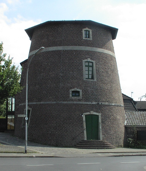 Der Mühlenturm im Schwalmtaler Ortsteil Amern, Dorfstraße 1a This image shows a heritage building in Germany, located in the North Rhine-Westphalian city Schwalmtal (Niederrhein) (no. 1).